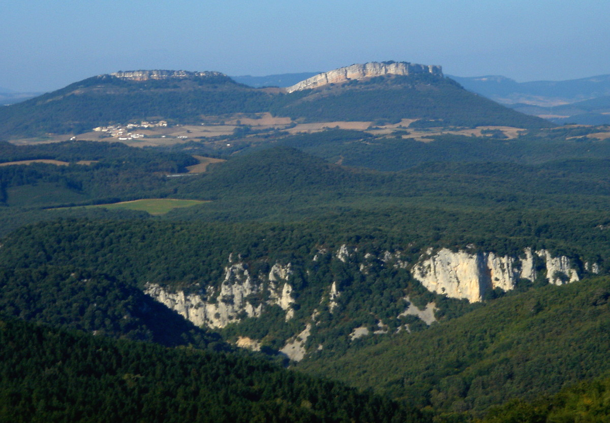 Muela mendia eta Durruma Kanpezu (Bernedo, Araba) bere magalean